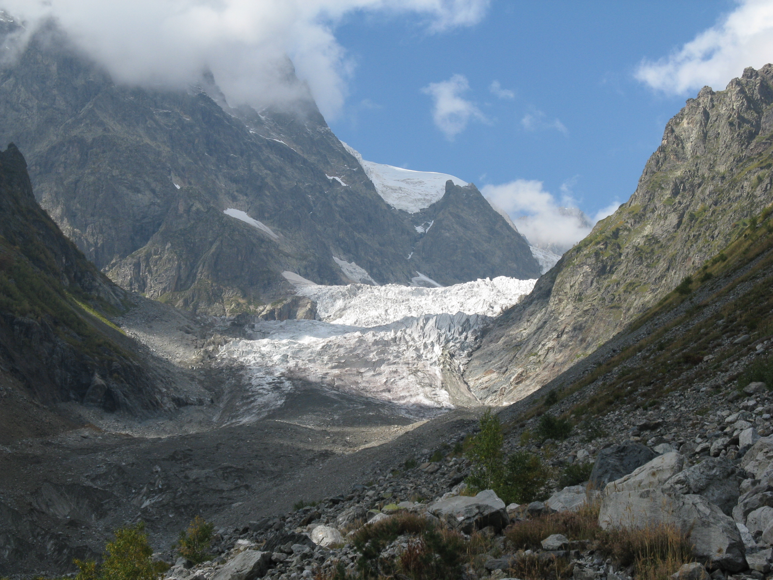 Chaladi glacier